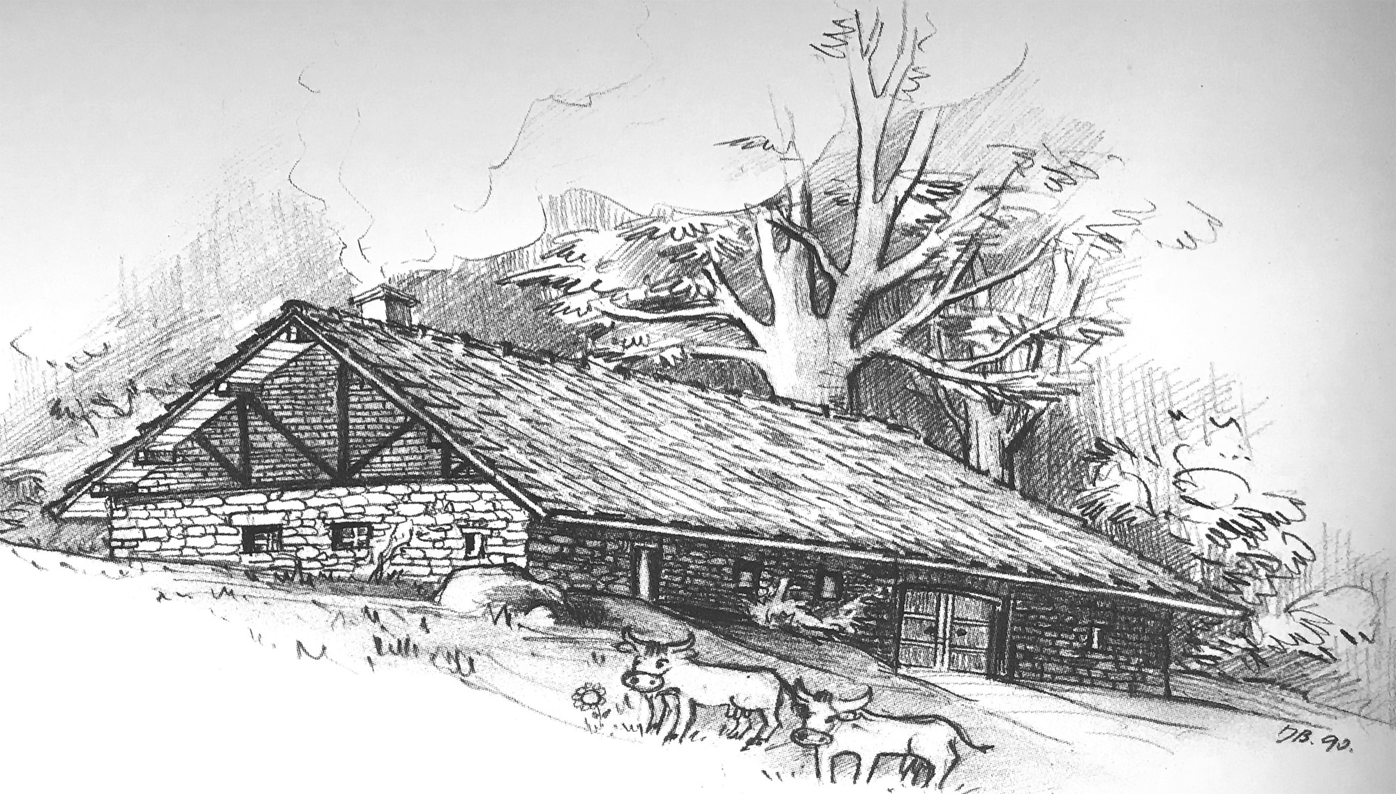 Oberkochen - Bilzhaus. Rekonstruktionszeichnung von Dietrich Bantel (1990)